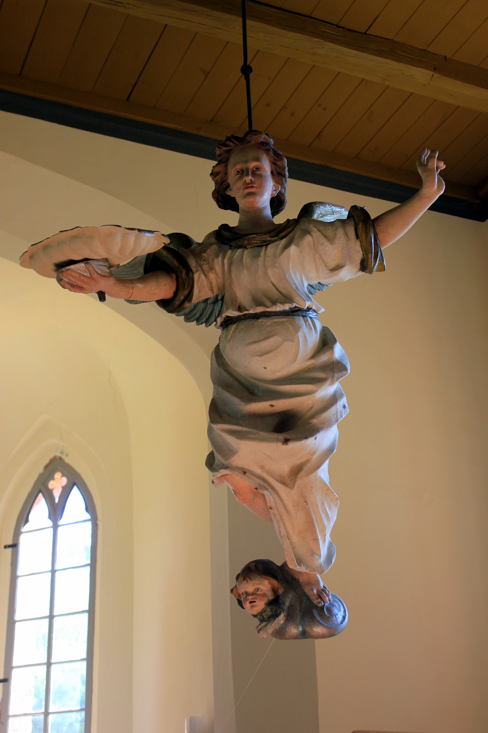 Hornjoserbsce: Ewangelska cyrkej w Skjarbošcu pola Drjowka.